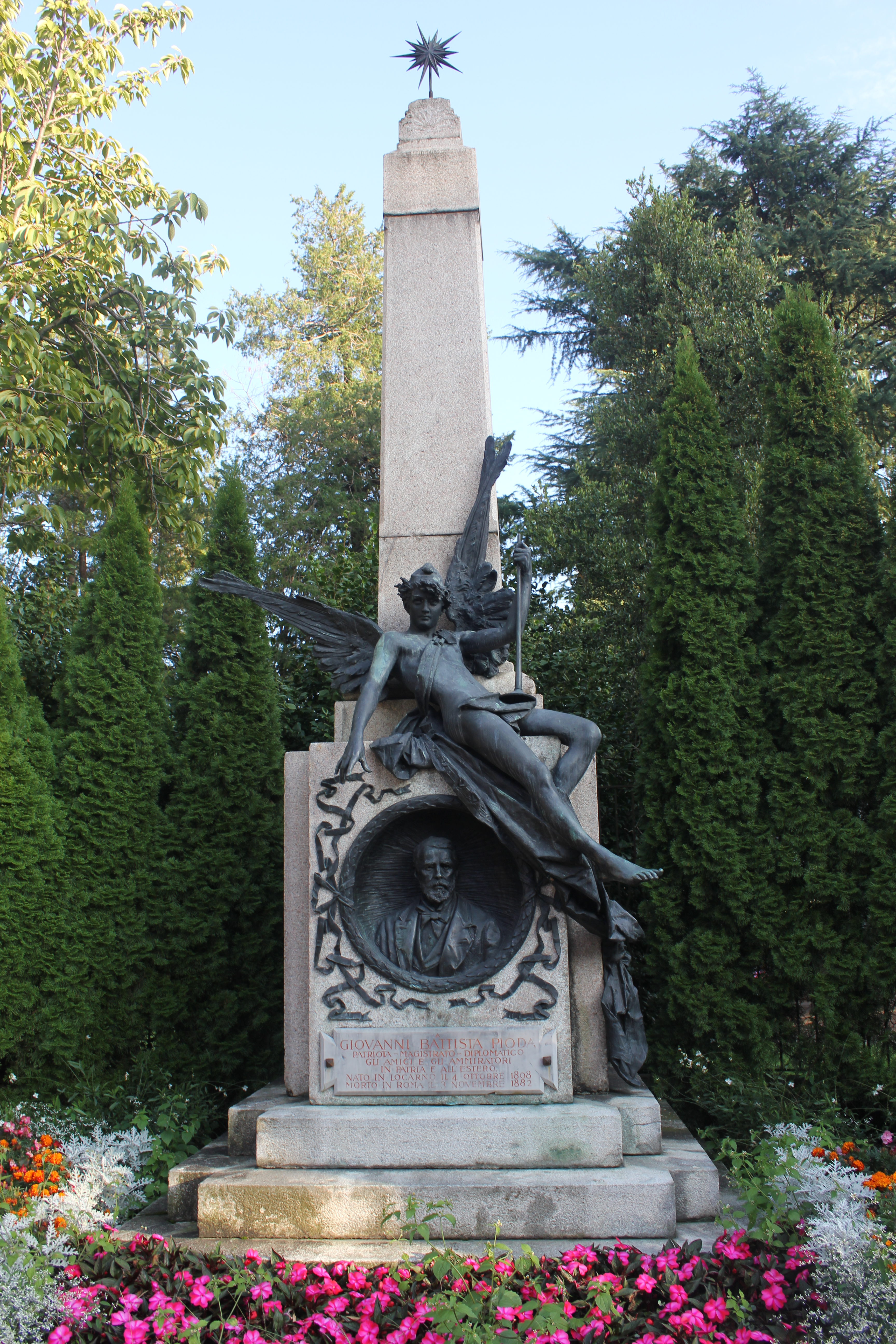 Il monumento a Giovanni Battista Pioda presso la chiesa di San Francesco a Locarno